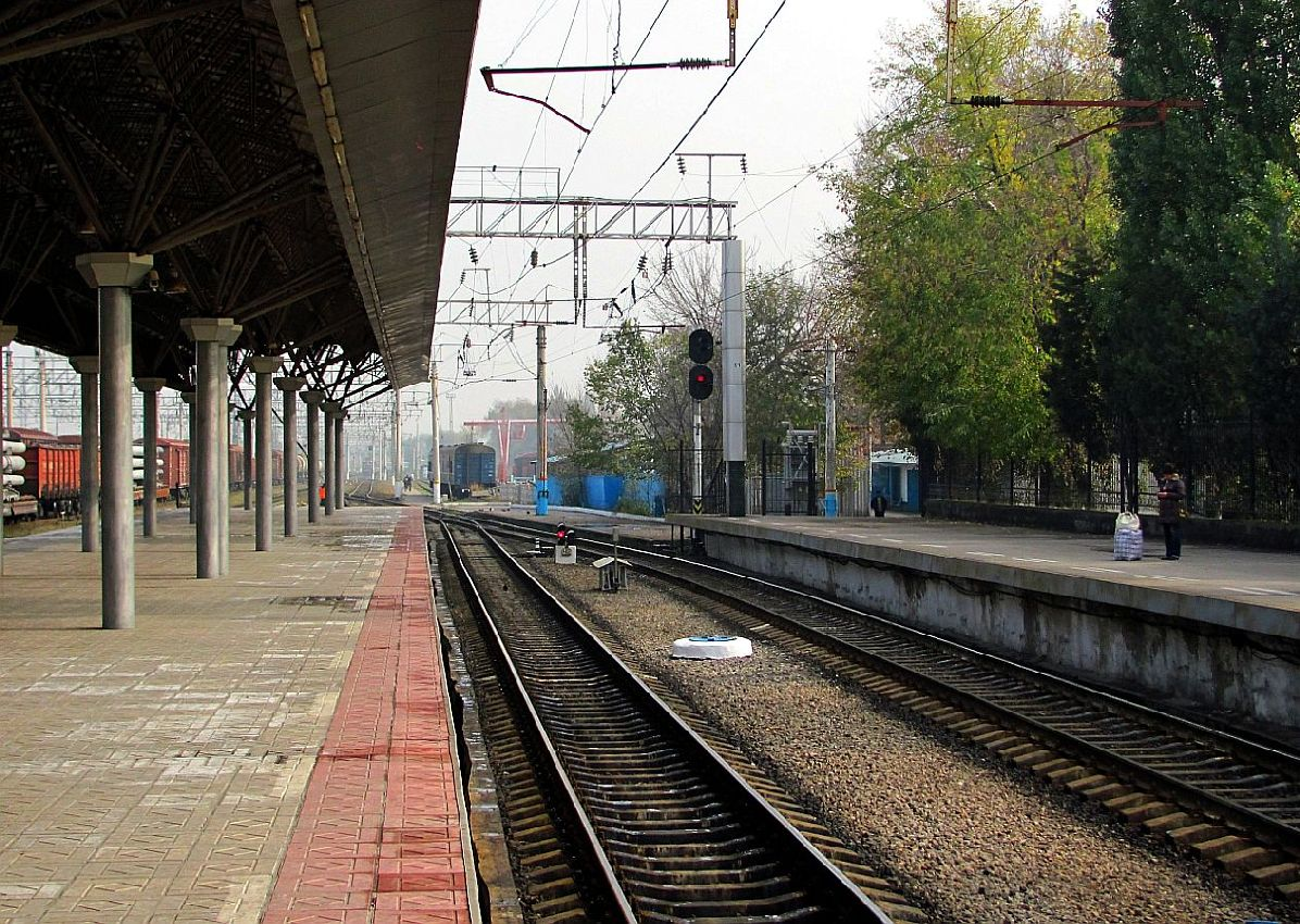 Железнодорожная станция Алматы-1